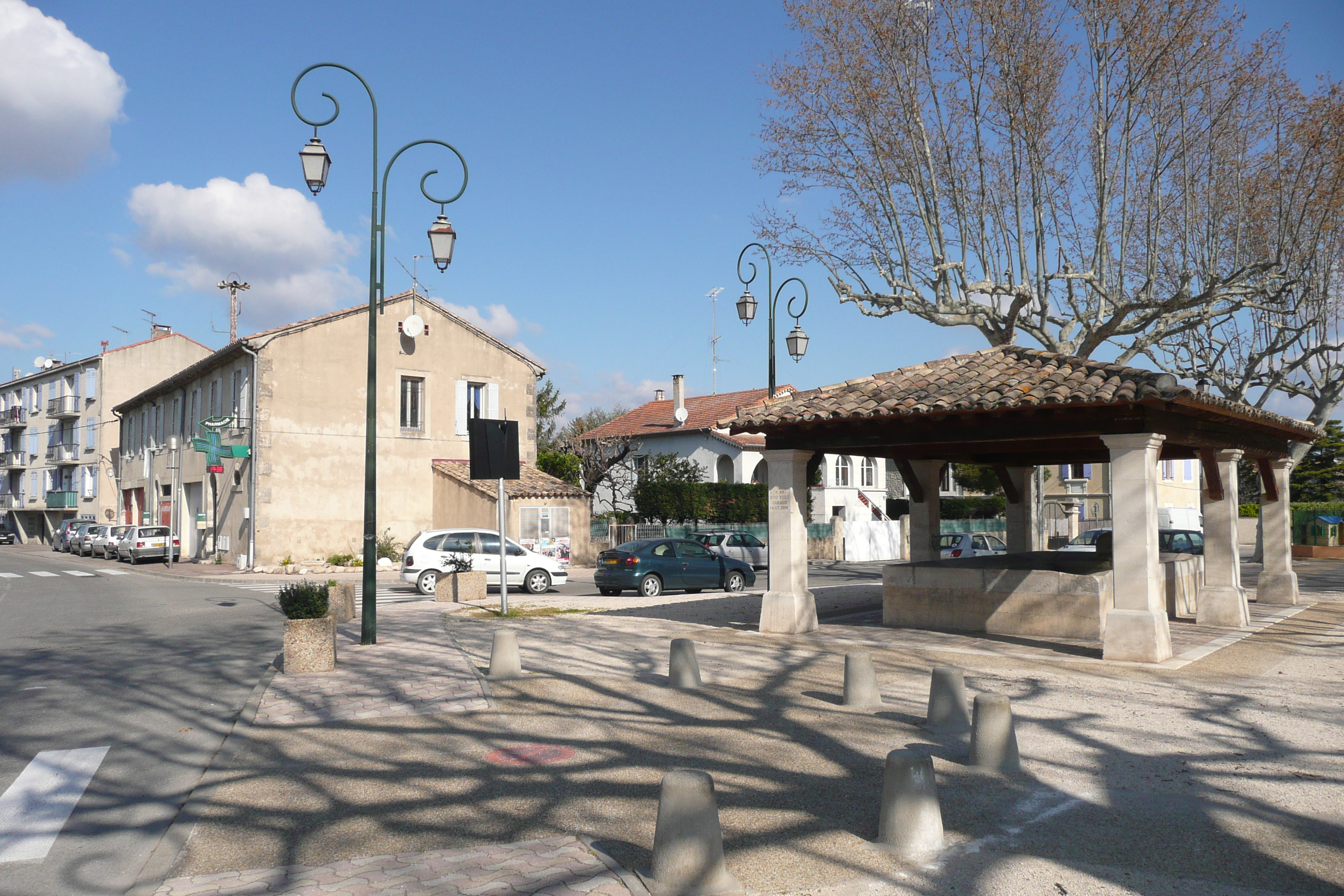 Lavoir à Cabannes (Bouches-du-Rhône, France).